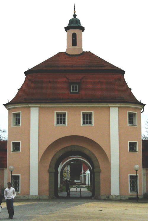 Ulm-Wiblingen Klostertor Selbst fotografiert von user:Enslin at 09-april-2006